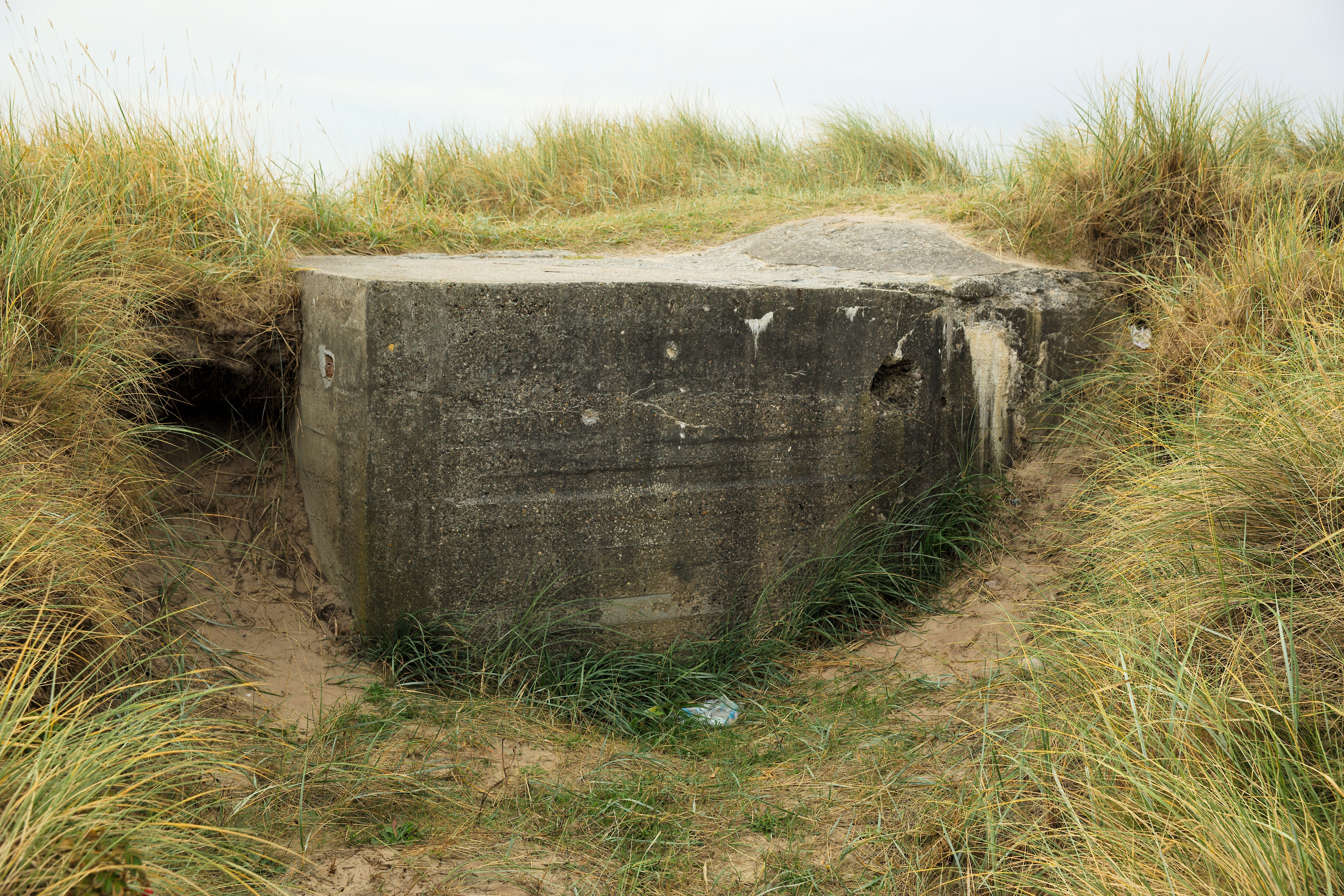 Tilsandet bunker ved Skiveren